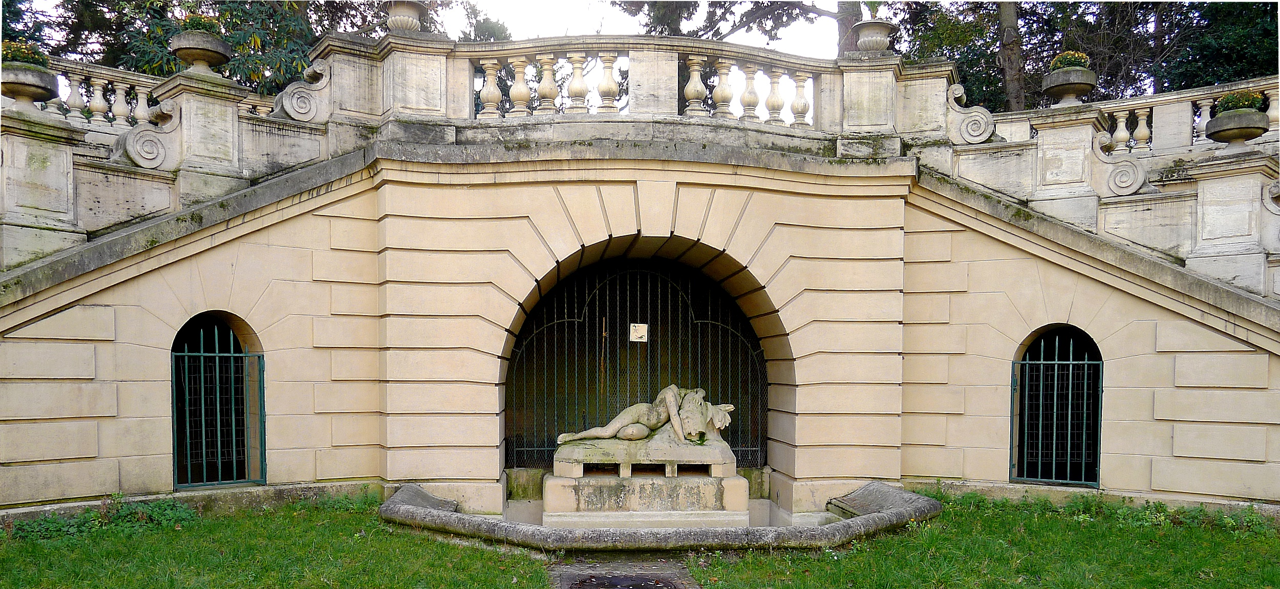 Fontaine du square des Arènes de Lutèce - René-Capitan - Paris V